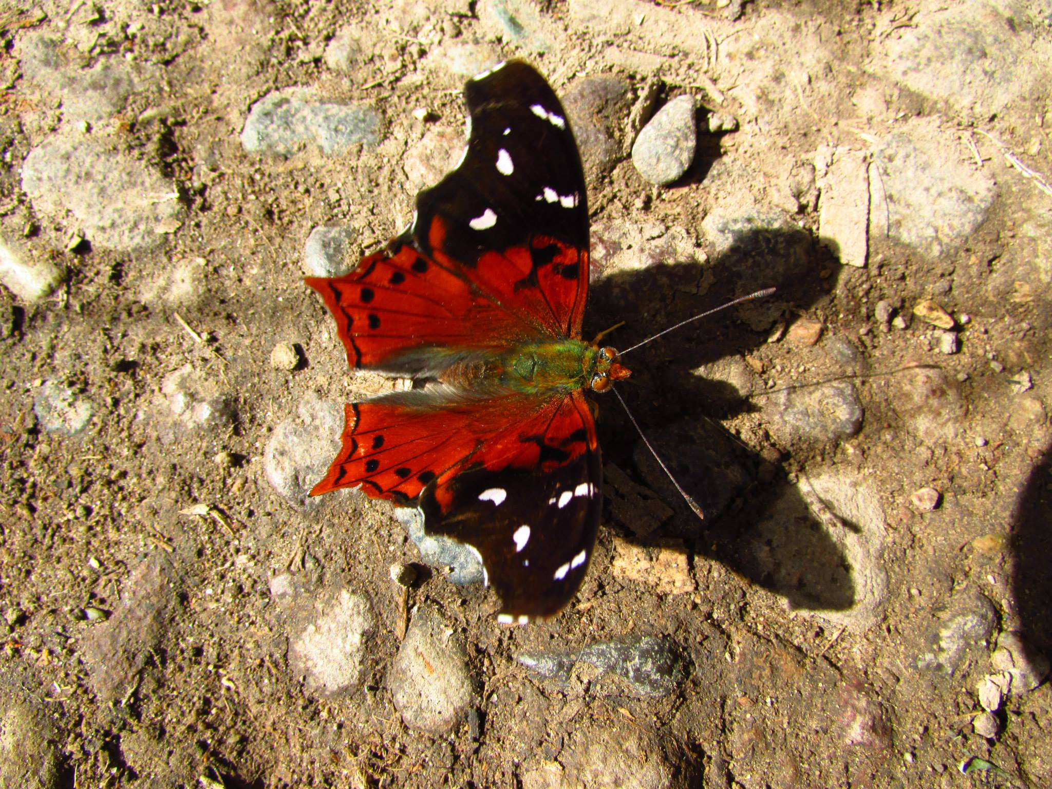 La mariposa es una clara representación de la fauna en el cantón. Existen varios colores de el mismo tipo de mariposa, pero esta en especial es más grande que las otras.